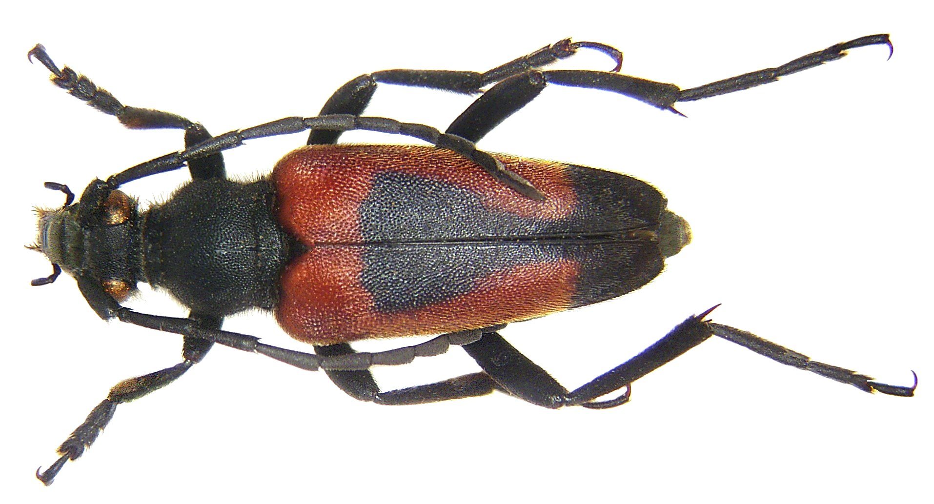 Stictoleptura cordigera Grösse: 14-20 mm Verbeitung: Europa Ökologie: Entwicklung in Laubbäumen Fundort: Korsika, Ghisonaccia leg. det. U.Schmidt, 1973 Foto: U.Schmidt, 2006